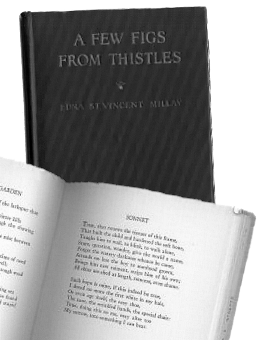 books